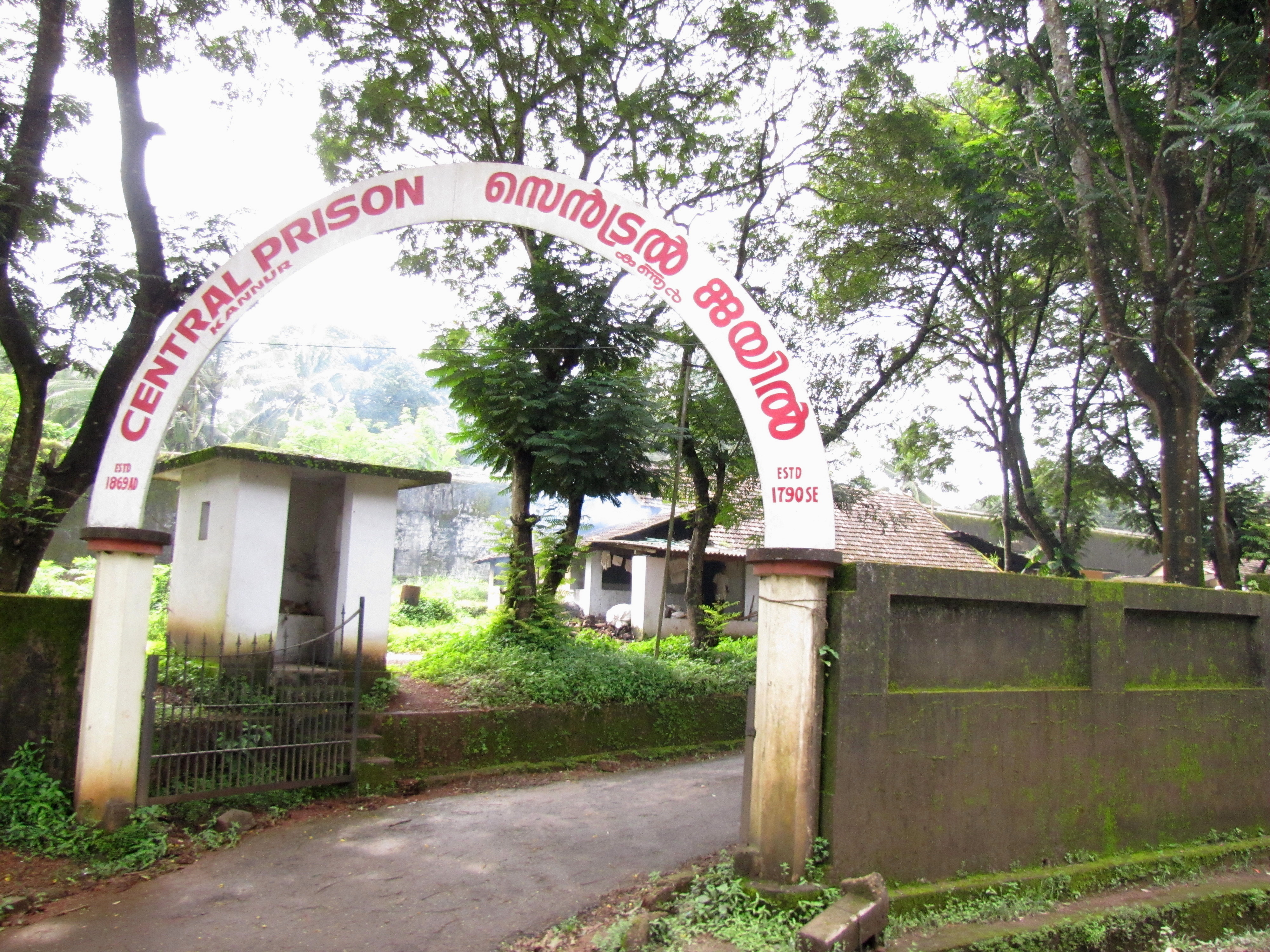 Central Prison Kannur